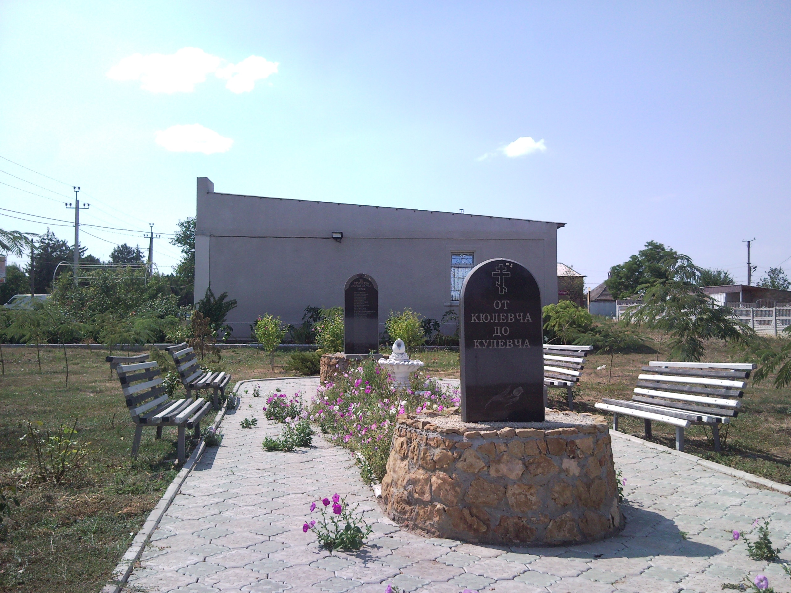 Кулевча Пам'ятний знак